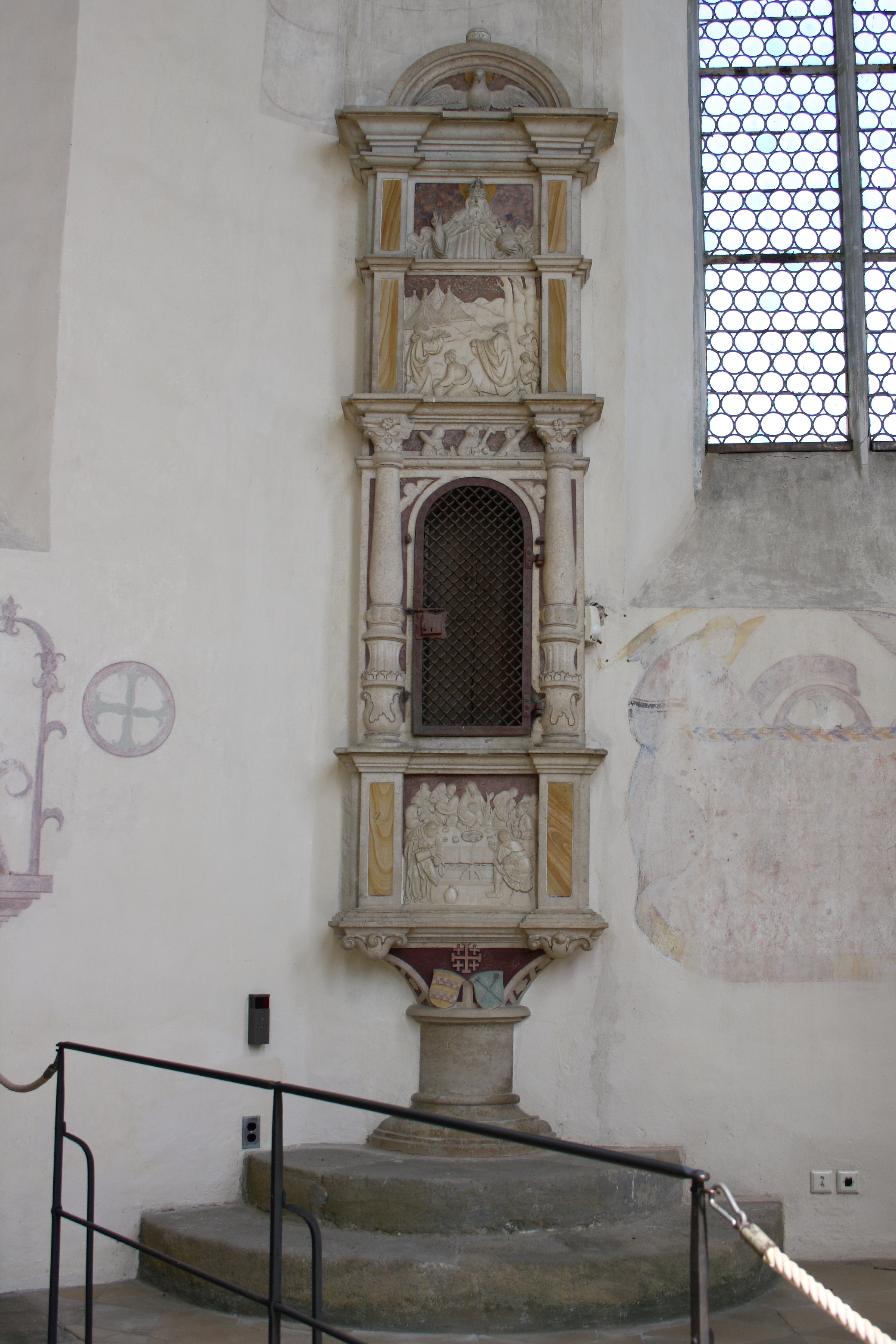 Evangelische Pfarrkirche, ehemalige Benediktinerklosterkirche St. Maria in Auhausen im Landkreis Donau-Ries (Bayern), Sakramentshäuschen im Stil der Renaissance von Loy Hering von 1521 mit der Darstellung der Mannaspeisung (oben) und der Einsetzung des Abendmahls (unten)